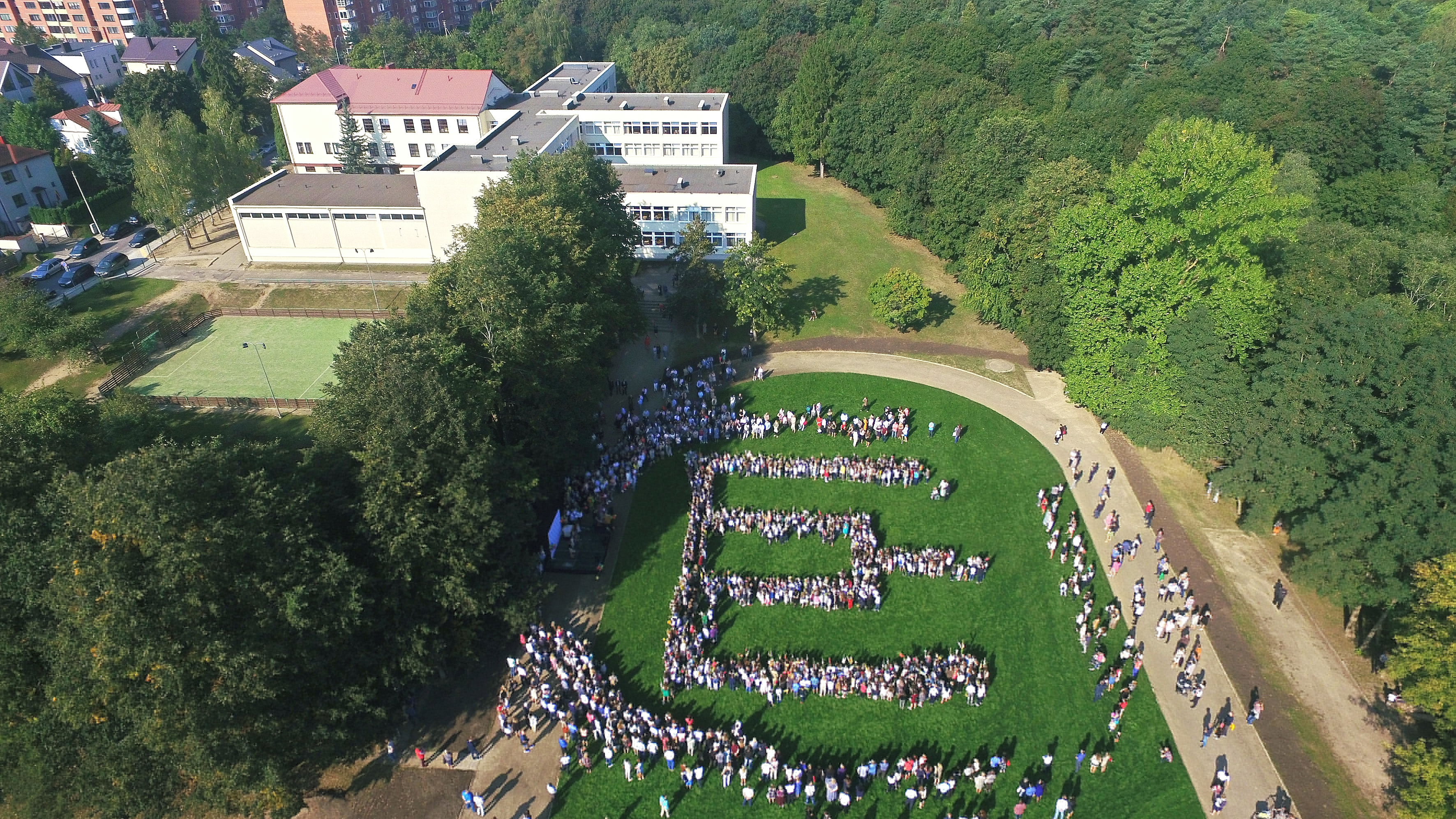 Mokslo metų pradžios šventė